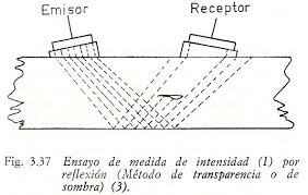 Emisión y recepción de informaación por USA